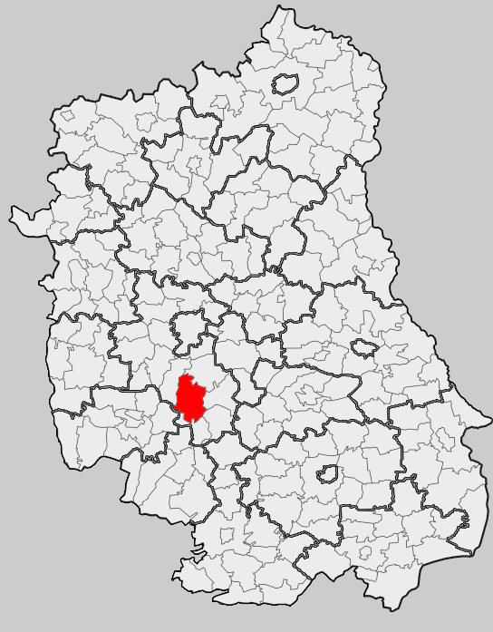 Map of gmina Bychawa, Lublin county, Lublin voivodship Mapa gminy Bychawa, powiat lubelski, województwo lubelskie